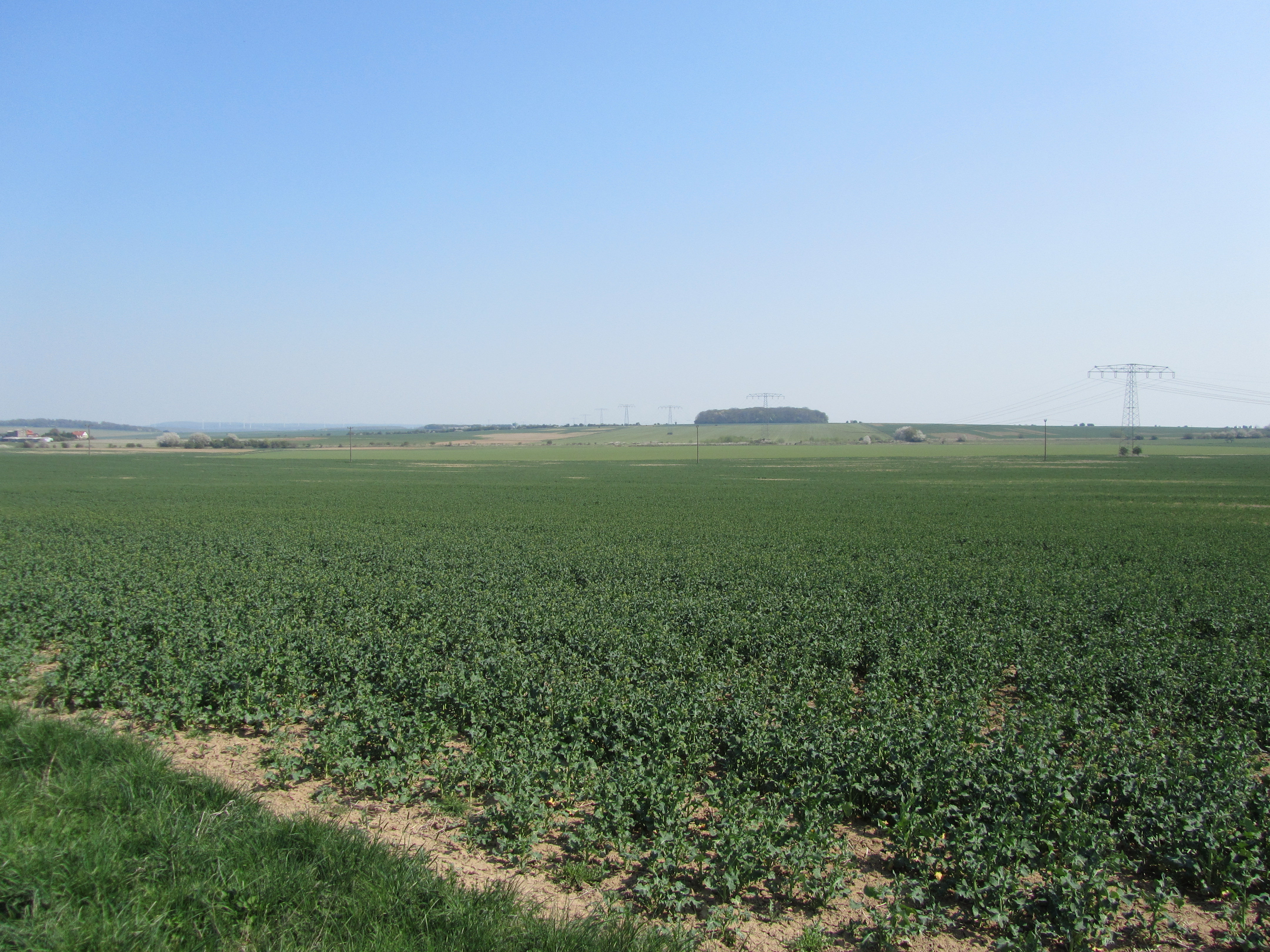 Das Thüringer Becken bei Holzthaleben (Thüringen).